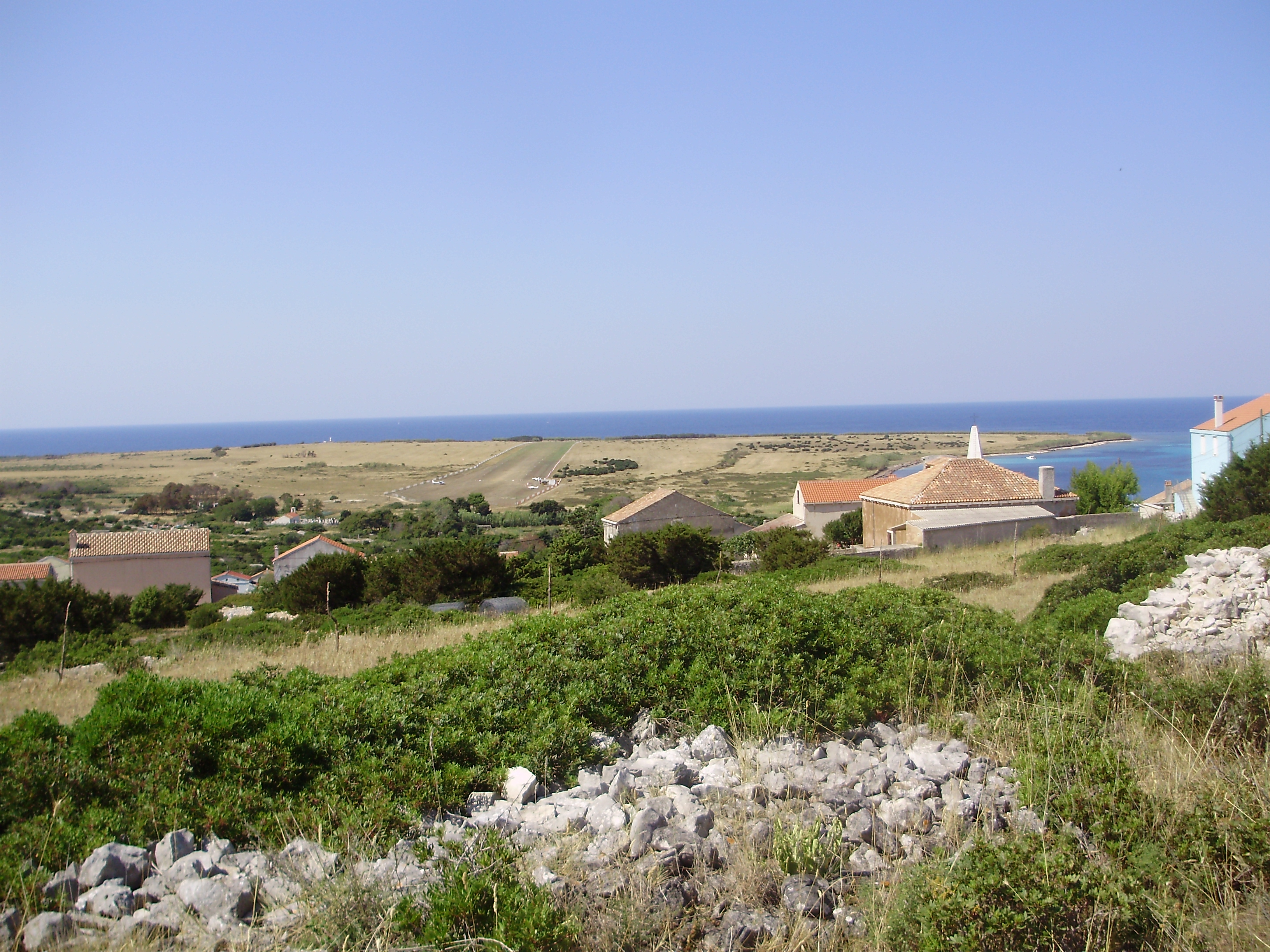 unije